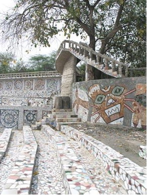 Nek Chand, "Rock Garden"